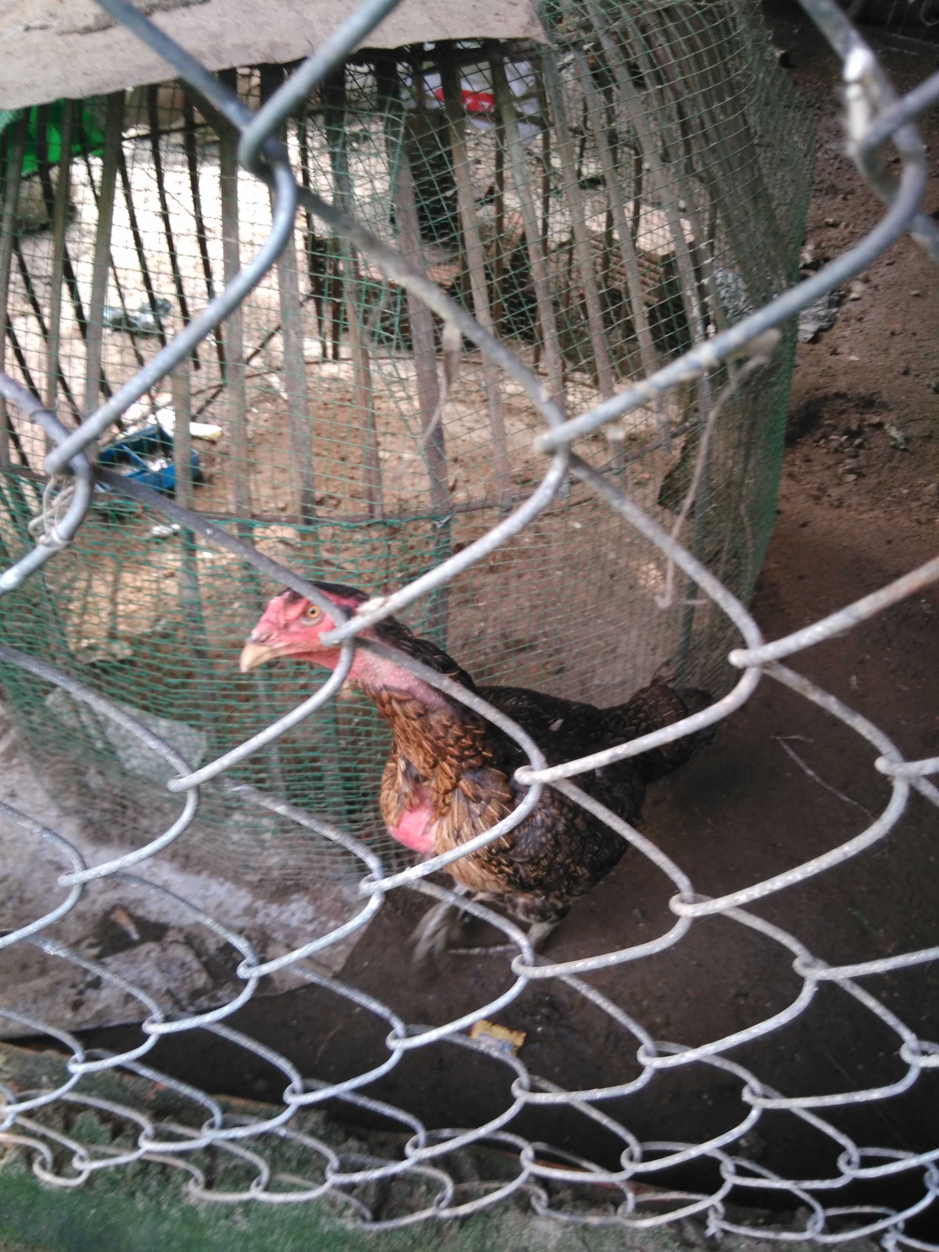 Hình chụp một con gà nòi